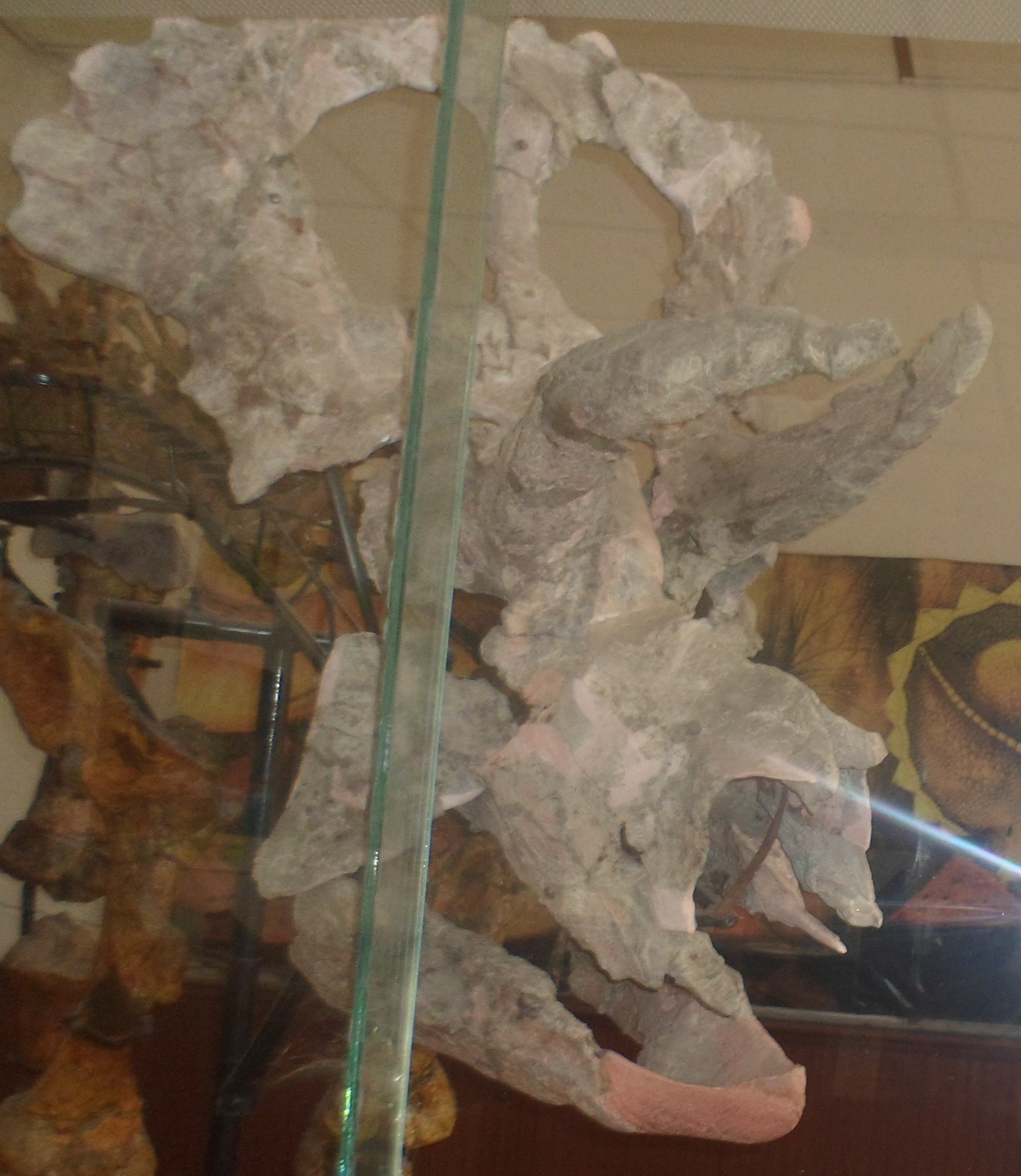 Cráneo de un Nasutoceratopsini no descrito y sin nombrar exhibido en el Museo del Mamuth en la ciudad de Chihuahua, proveniente del municipio de Aldama. Aunque no ha sido descrito formalmente ni de forma adecuada se ha hecho mención de los restos fósiles en tres artículos Ramírez-Velasco & Hernández-Rivera 2015a y b, y "Rivera-Sylva y Carpenter 2014b: "hay algunos ejemplares que presentan rasgos semejantes al centrosaurino Nasutoceratops de Utah (RAMÍREZ-VELASCO y HERNANDEZ-RIVERA, 2015). Si así fuera, esto representaría una nueva especie y, por la edad, una de las más antiguas de Norteamérica" [1] "Rivera-Sylva y Carpenter (2014b) mencionan dos esqueletos de chasmosaurinos exhibidos en el Museo del Mamut de Chihuahua. Uno de ellos presenta rasgos craneales semejantes a Nasutoceratops (Sampson et al., 2014), por lo que se le considera como probable centrosaurino." [2] References ↑ RAMÍREZ-VELASCO, Ángel Alejandro y René Hernández Rivera, "Los dinosaurios de México: su historia contada por huesos y dientes", Revista Digital Universitaria, 1 de noviembre de 2015, Vol. 16, Núm. 11. Disponible en Internet: ISSN: 1607-6079. ↑ Ramírez-Velasco, A. A. and Hernández-Rivera, R., 2015. Diversity of late cretaceous dinosaurs from Mexico. Boletín Geológico y Minero, 126 (1): 63-108ISSN: 0366-0176